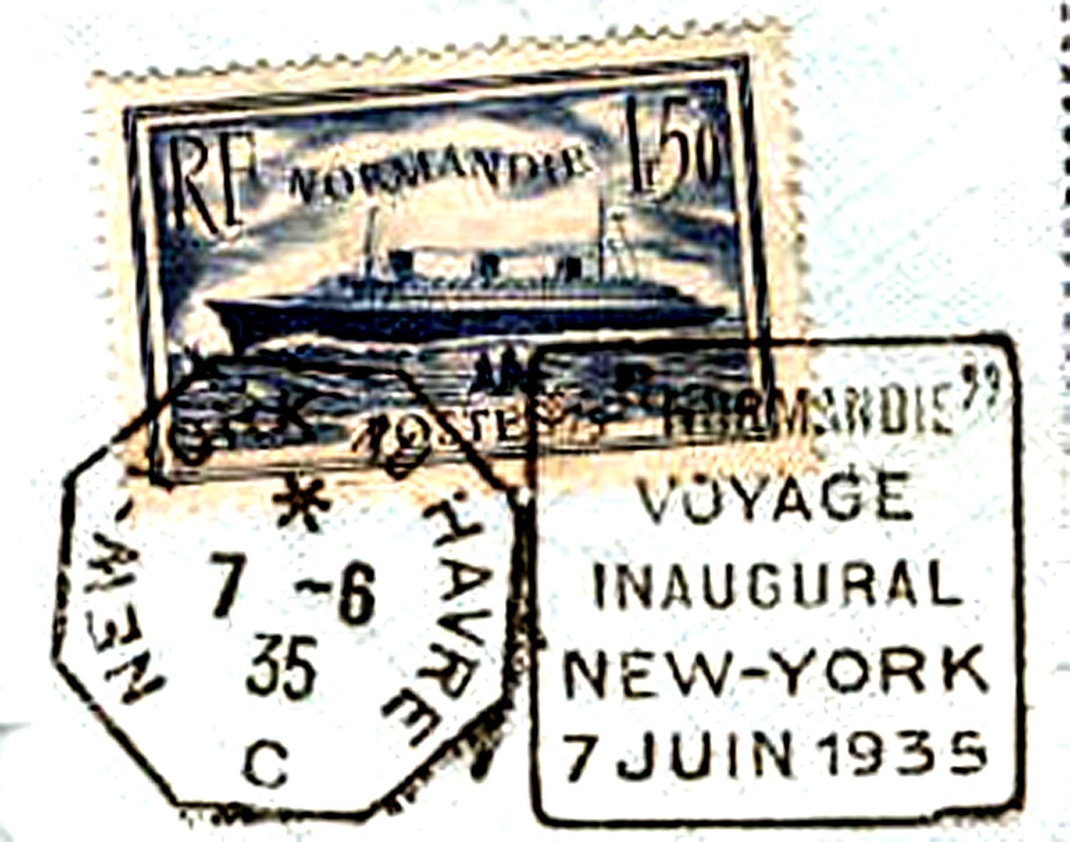 Cachet Daguin flamme à droite pour inauguration Normandie